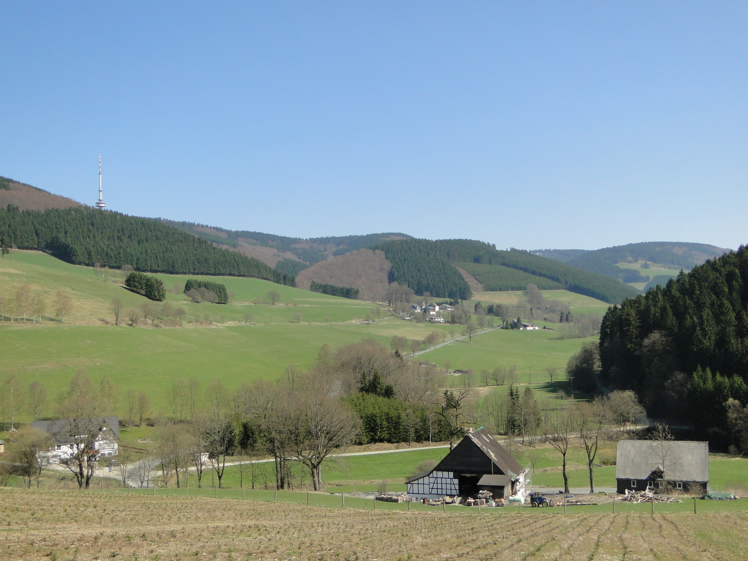 Blick auf Rellmecke ,Mittelsorpe sowie das mittlere Sorpetal